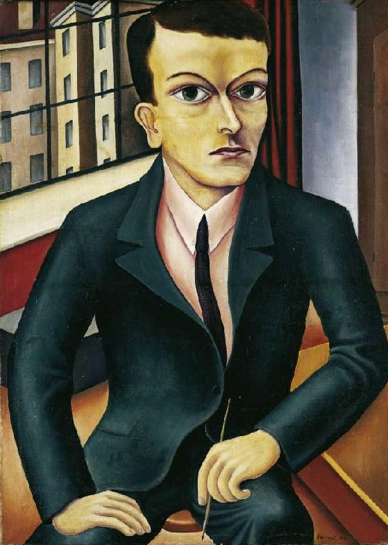 Selbstbildnis 1918/1919